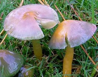 Hygrocybe psittacina agés